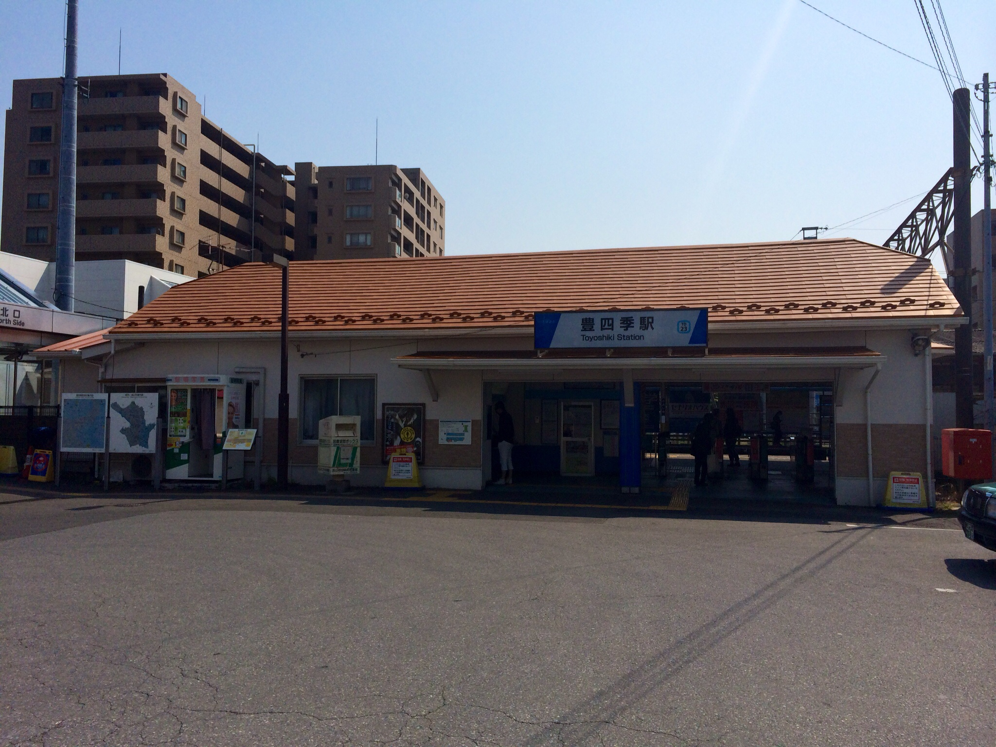 東武野田線豊四季駅